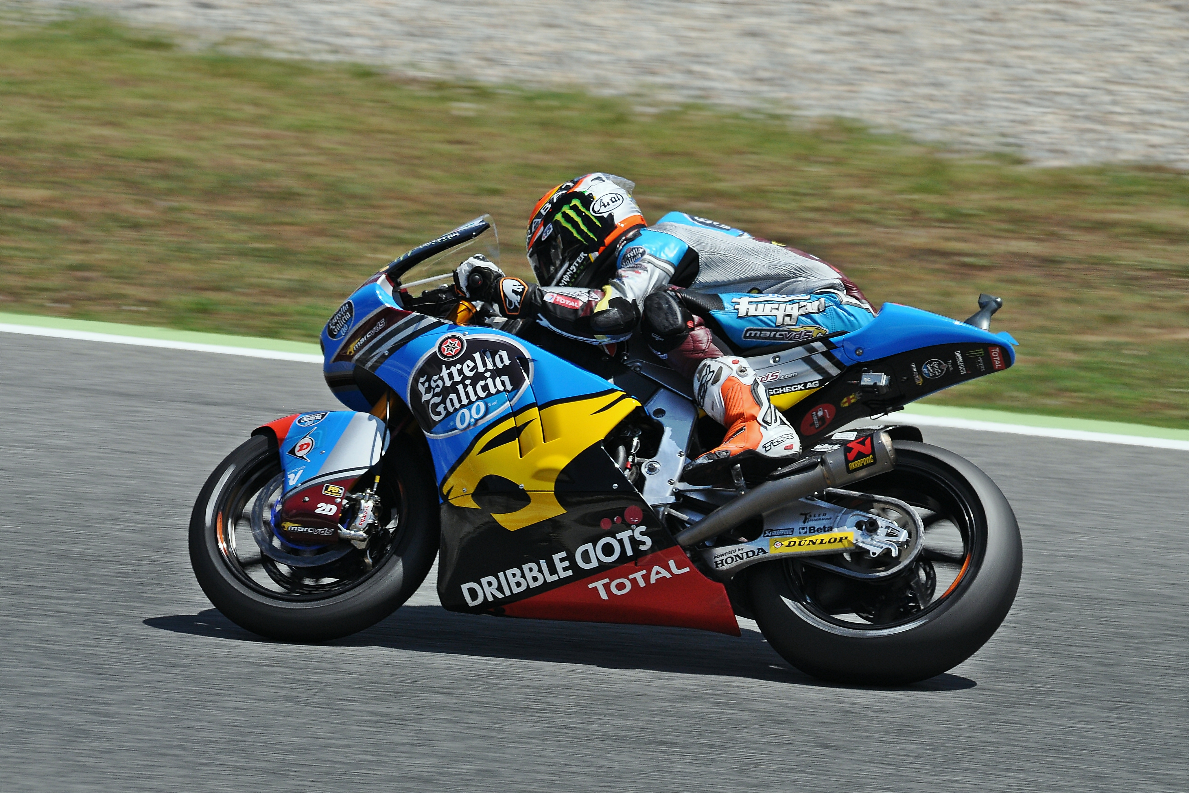 gran premio de cataluña